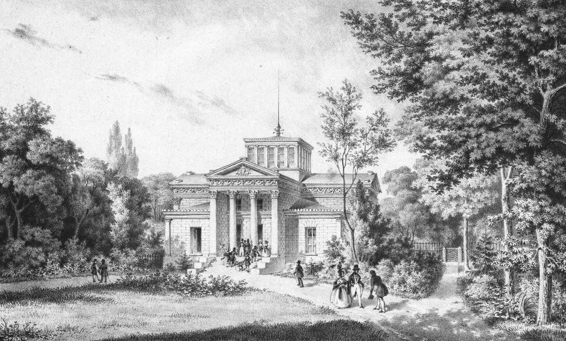 Vue du Pavillon d'habitation du Parc de Mouceaux [sic], Lemoine-Benoît 1838, lithographie de Lemercier, Bernard et Cie.